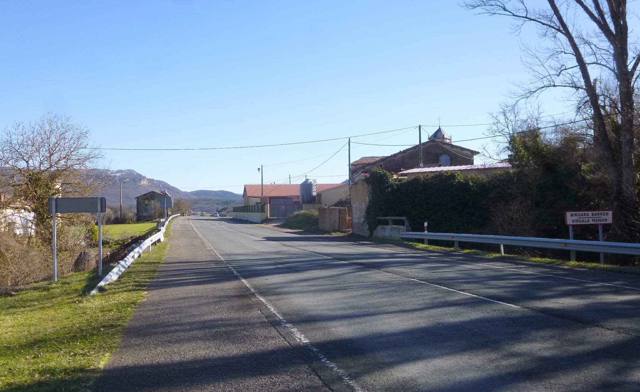 Virgala Menor (Arraya-Maestu, Álava)